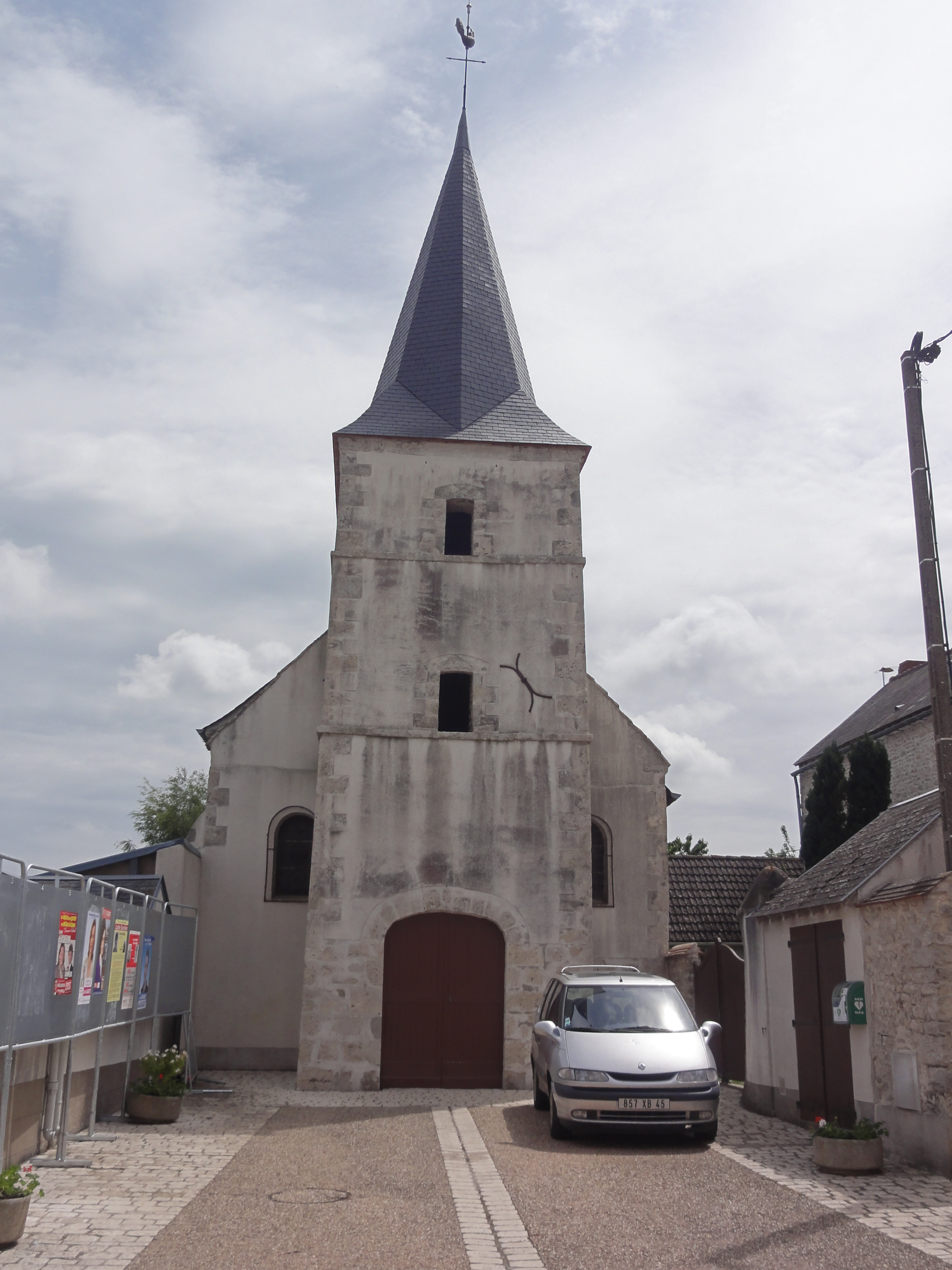 Boisseaux (Loiret) Église